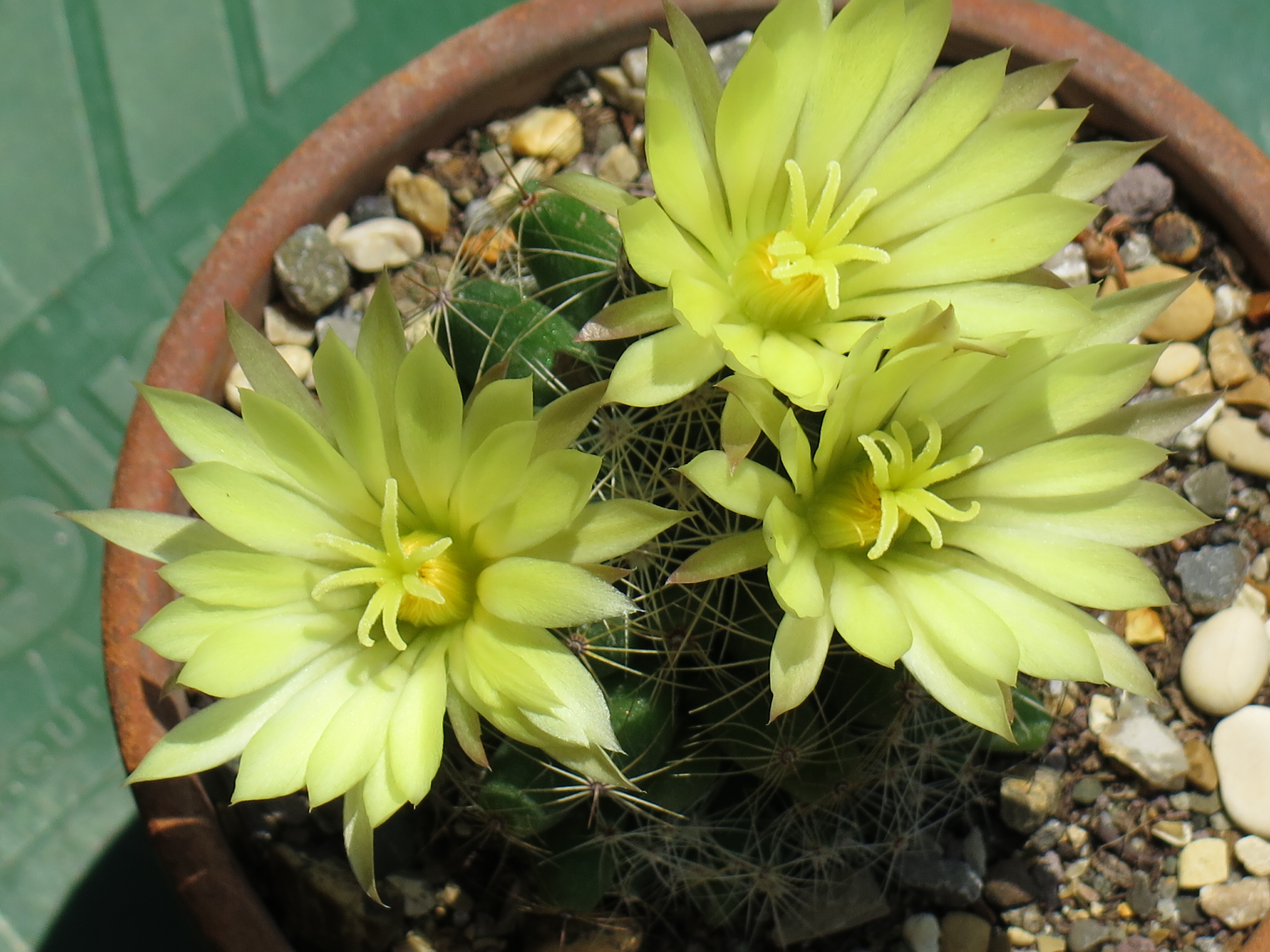 I fiori della mammillaria longimamma var. sphaerica